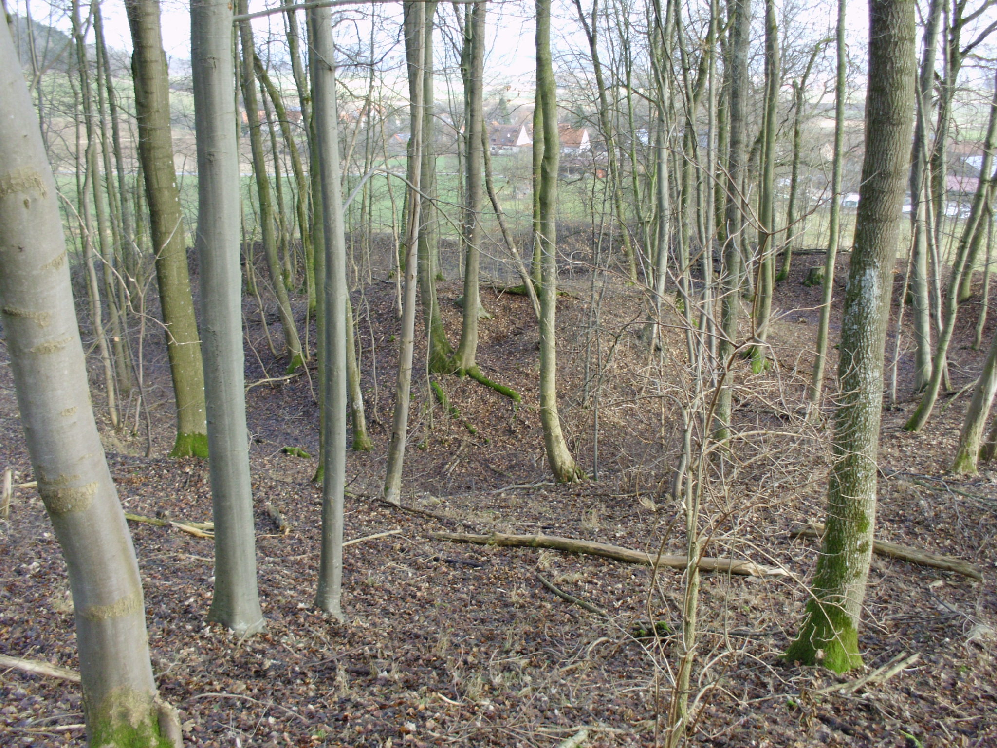 Burgstall Lunkenburg bei Meinheim-Wolfsbronn, Landkreis Weißenburg-Gunzenhausen (Deutschland/Bayern)